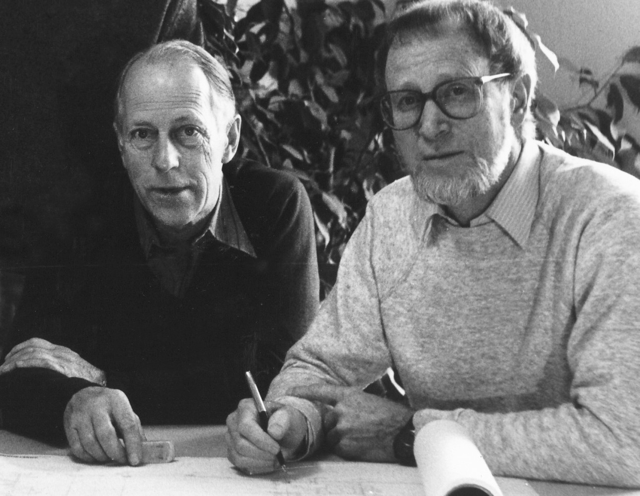 Bengt Jedgard (vänster) och Yngve Fredriksén på FJ-Konsult